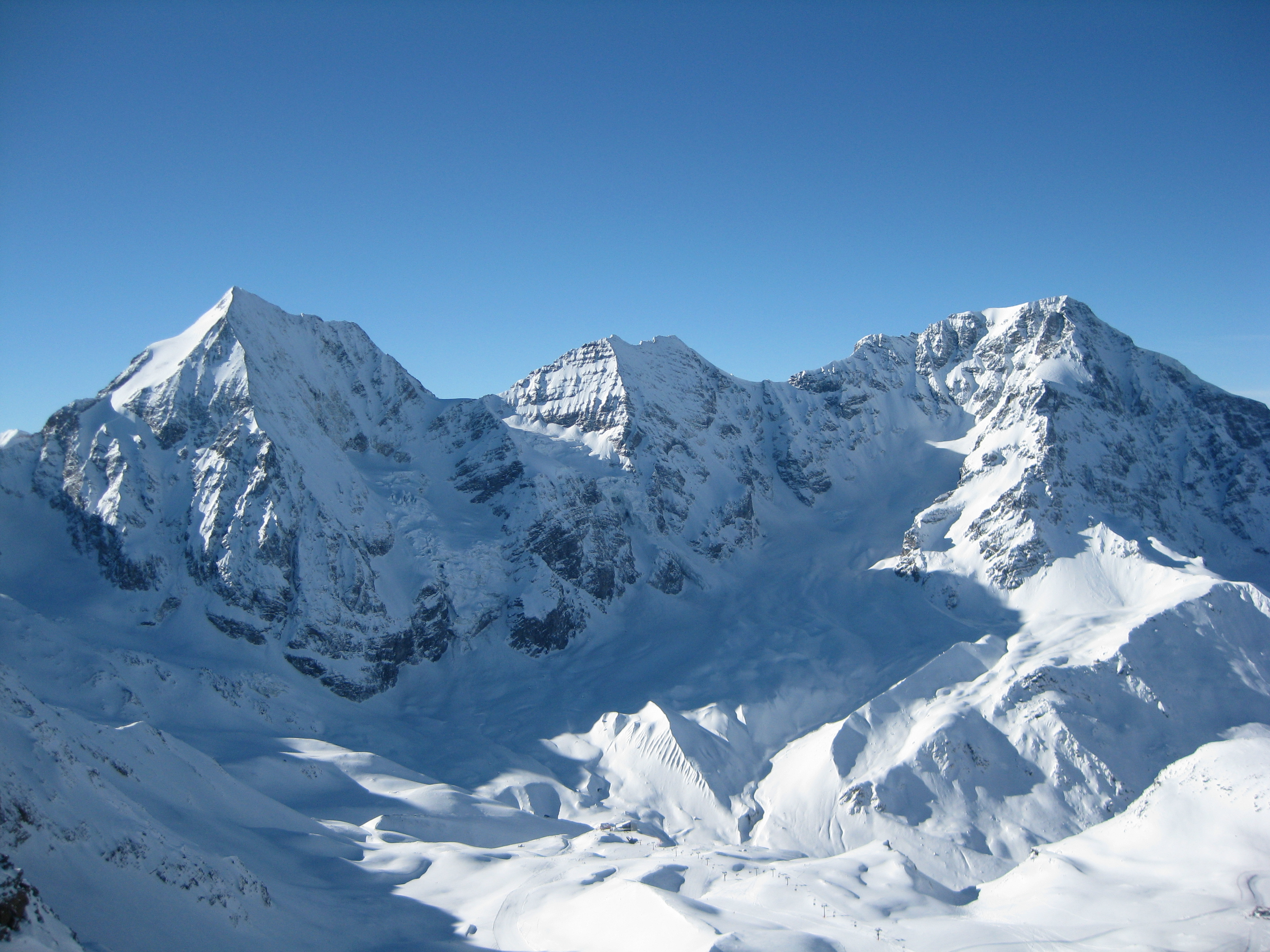 Königsspitze, Zebrù und Ortler von der Madritschspitze